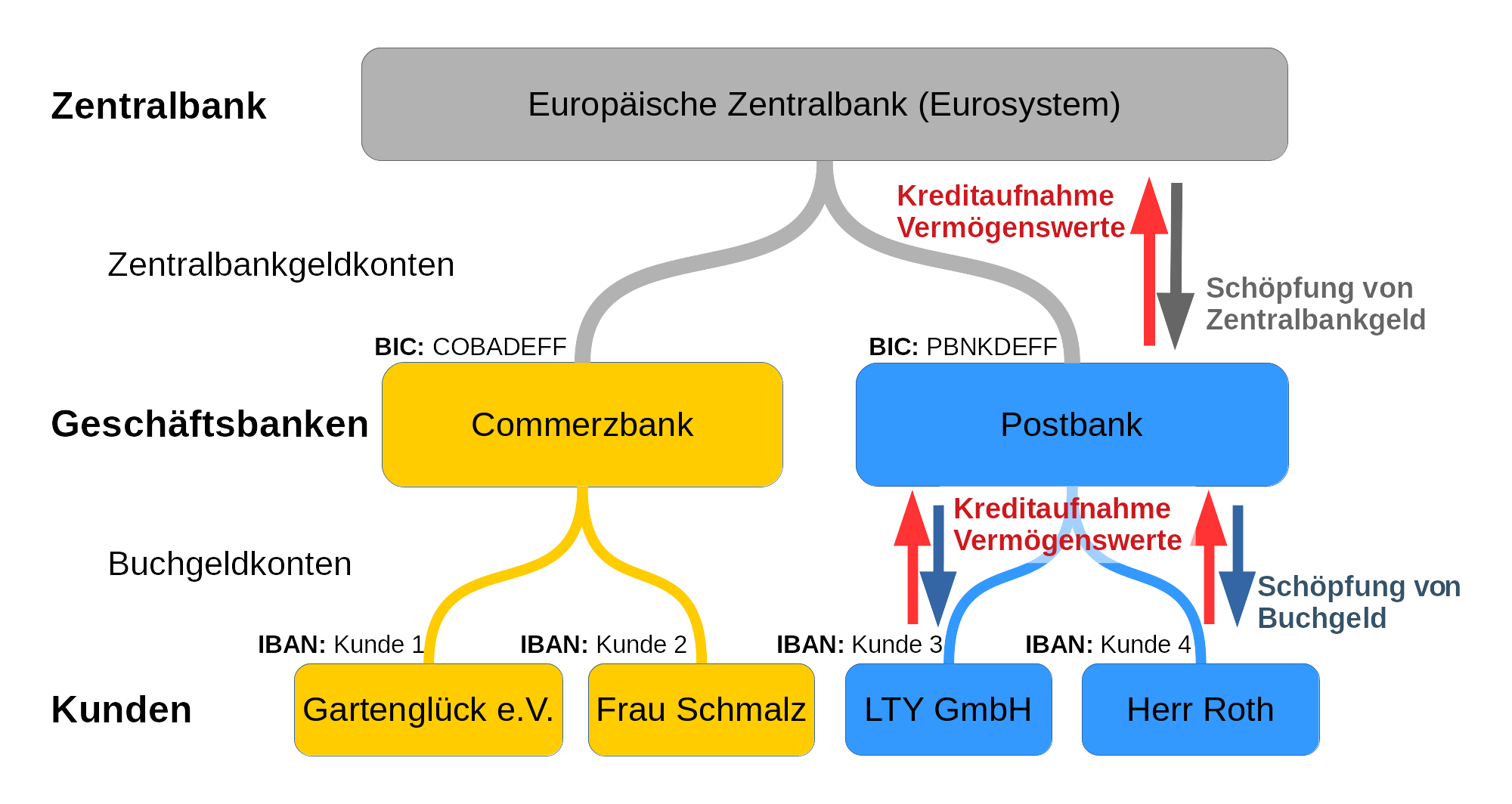 Vereinfachte Hierarchie des Bankensystems am Beispiel der Europäischen Zentralbank mit zwei deutschen Banken und deren Kunden mit BIC und IBAN sowie einem Staat